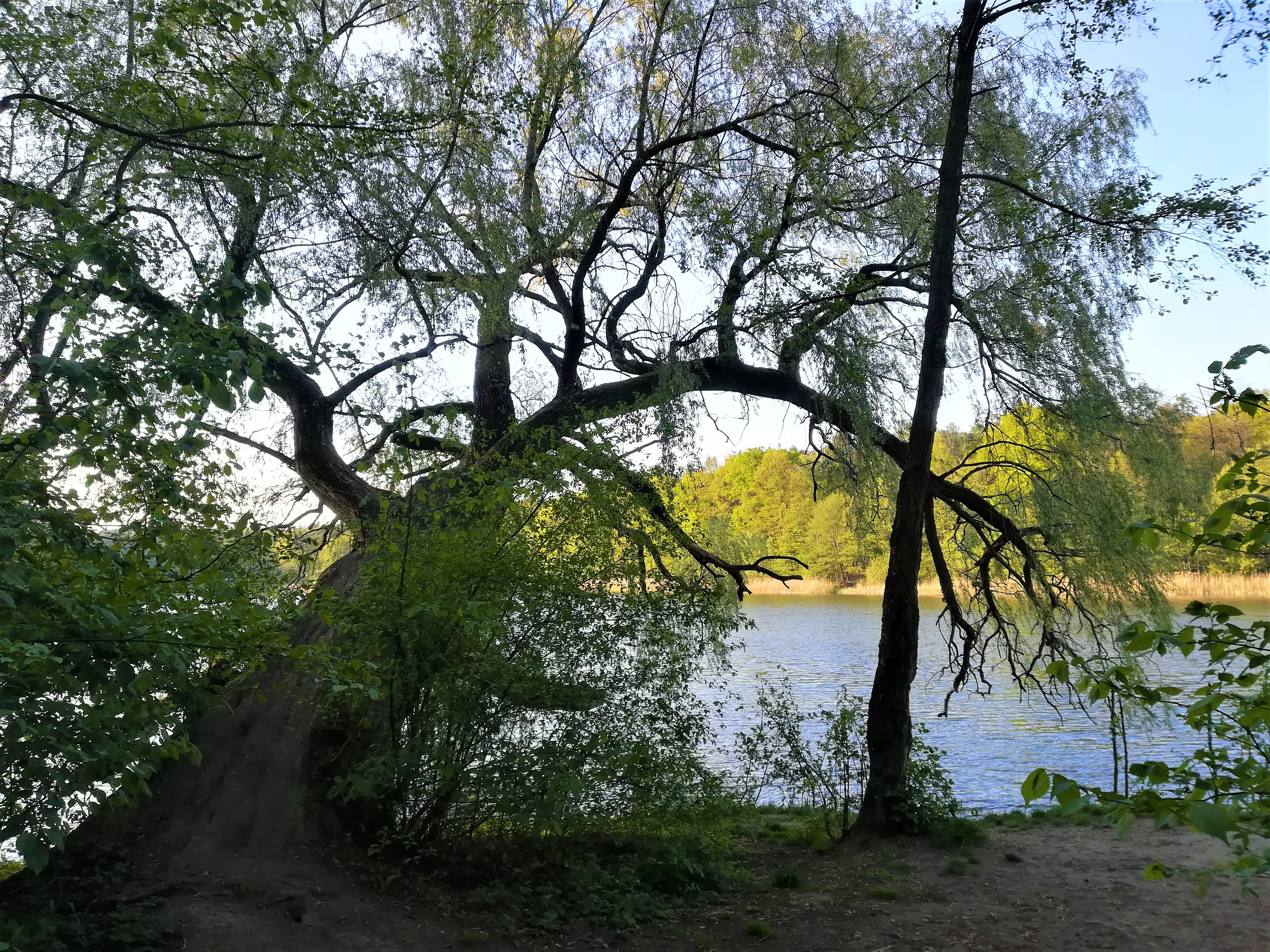 Wielkopolski Park Narodowy: jezioro Jarosławieckie.